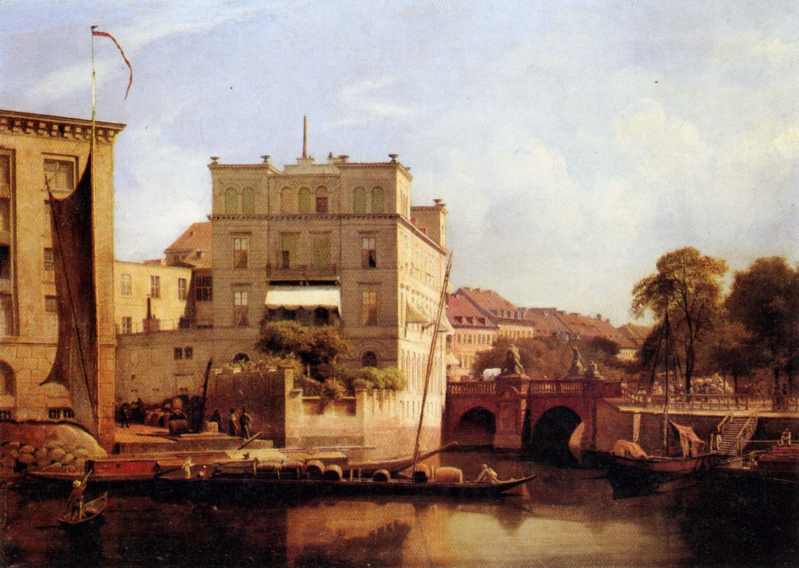 Die historische Herkulesbrücke (zeitgenössisch auch: Simsonbrücke) über den Königsgraben in Berlin; abgebrochen 1890.